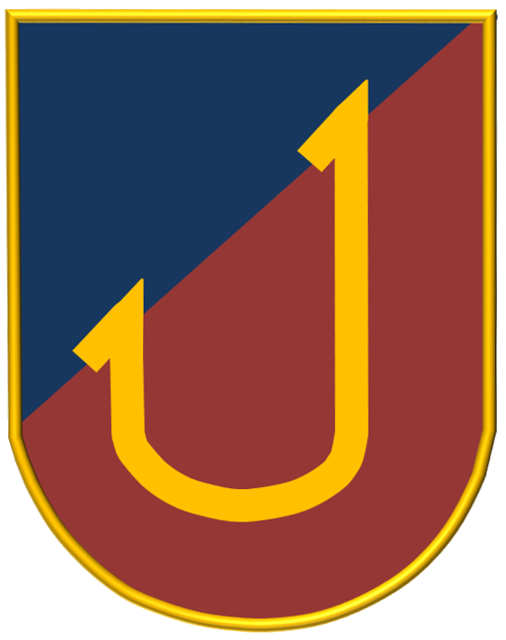 Wappen U11 (Bundeswehr) S190